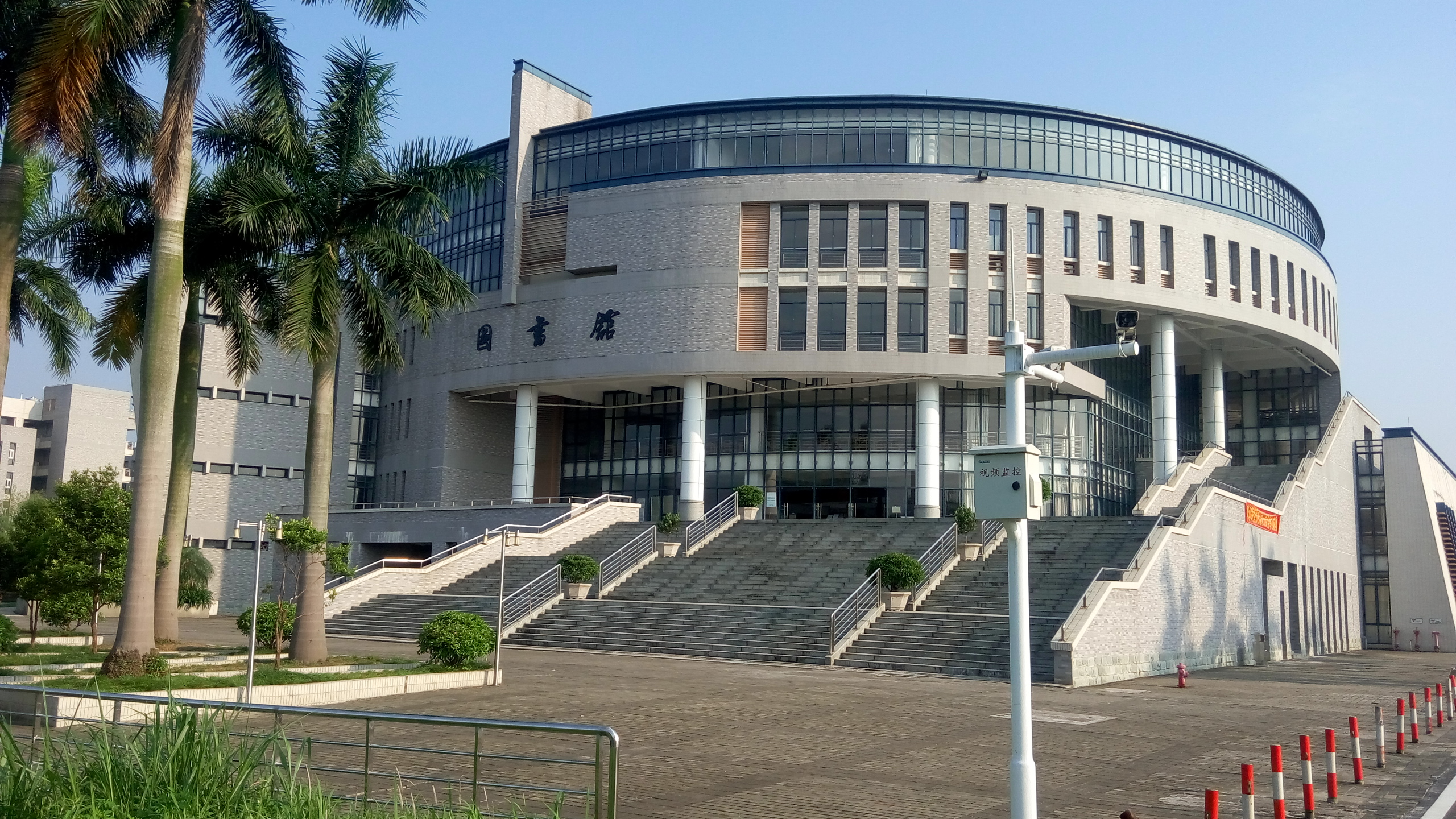 中文（中国大陆）: 广东南华工商职业学院图书馆